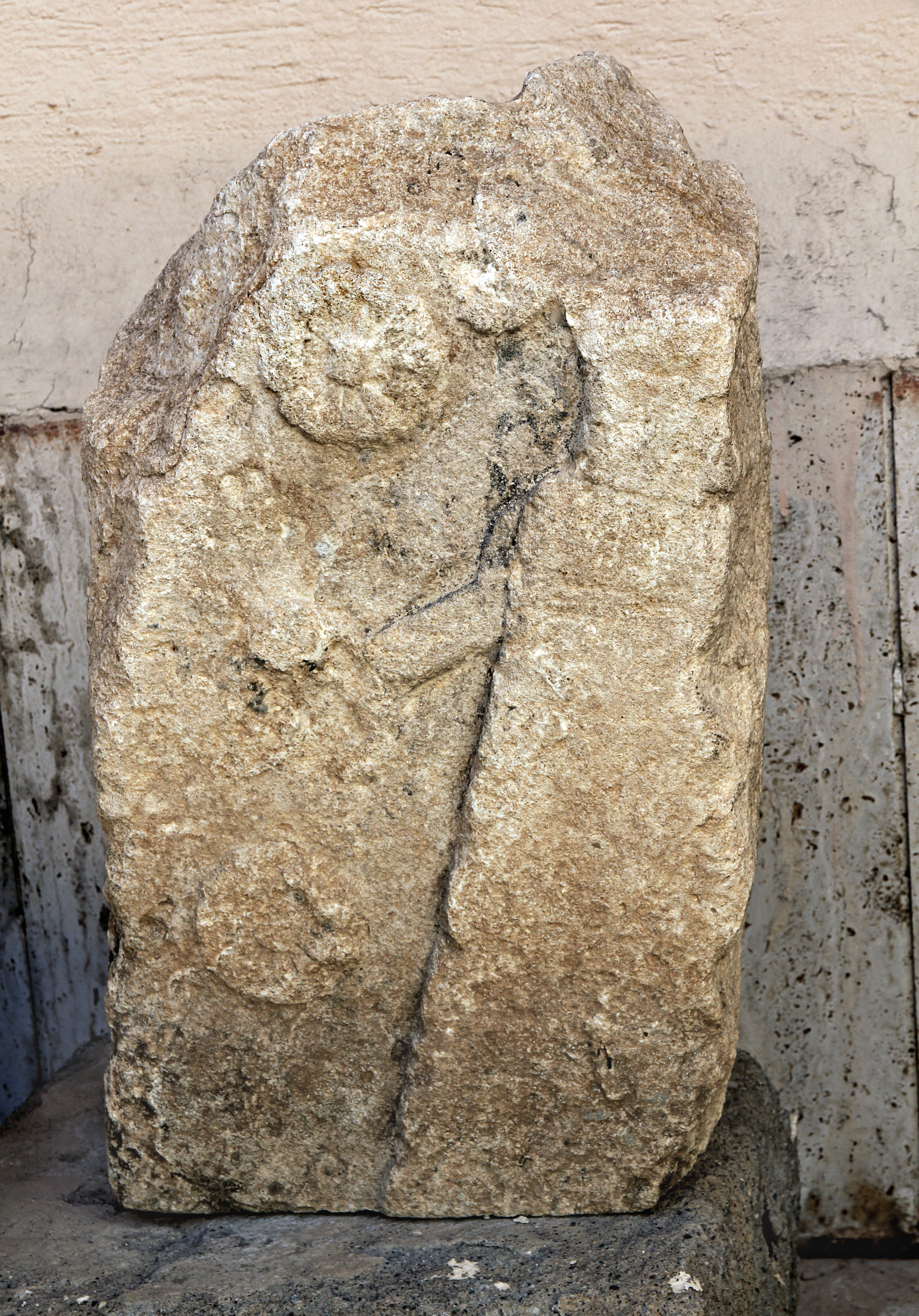 Stele Adıyaman 1 des hethitischen Wettergottes im Archäologischen Museum Adıyaman, Türkei, Oberteil Vorderseite